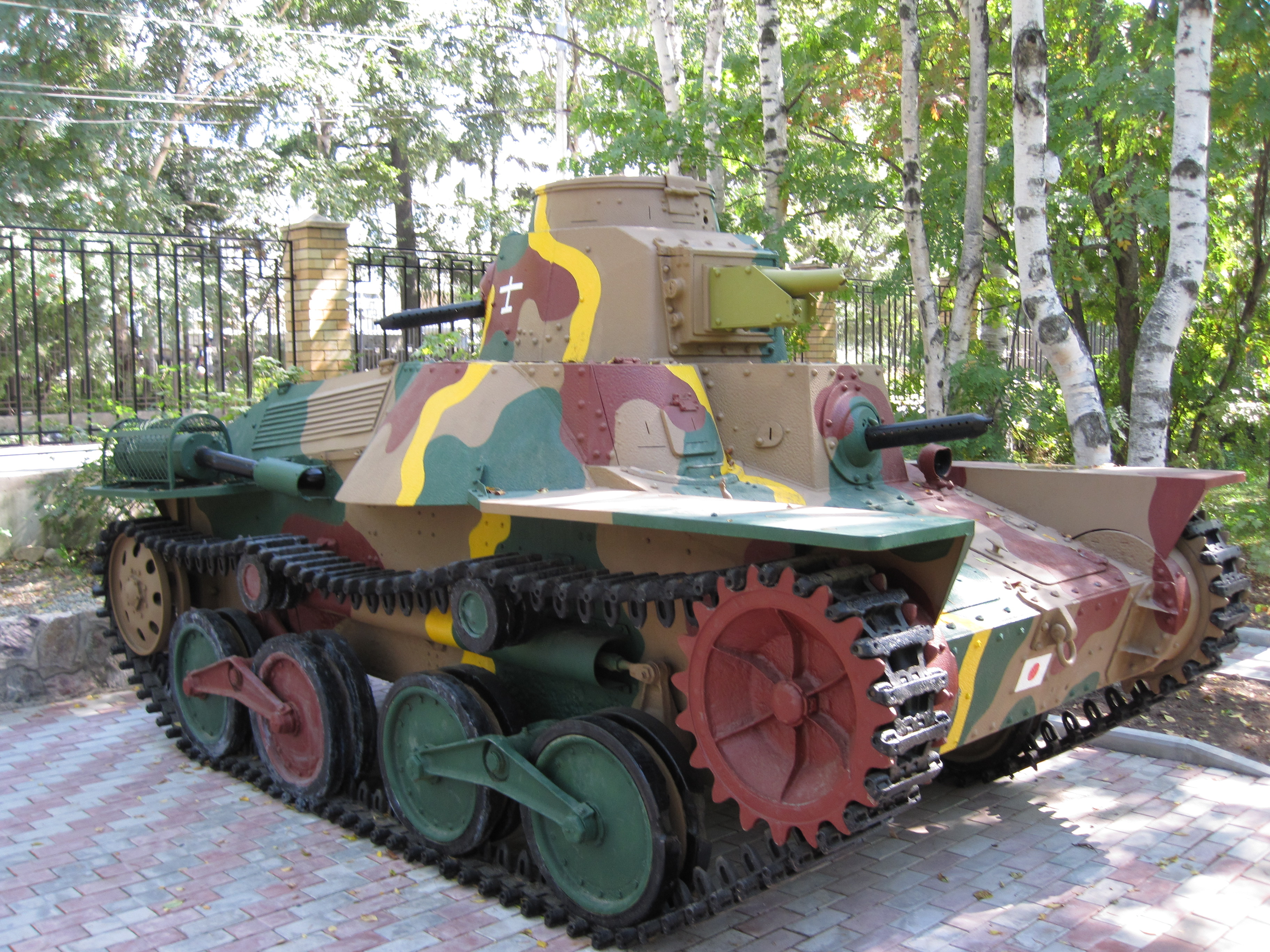 Танк тип 95 "Ха-Го" в экспозиции Сахалинского краеведческого музея. 2010 г.